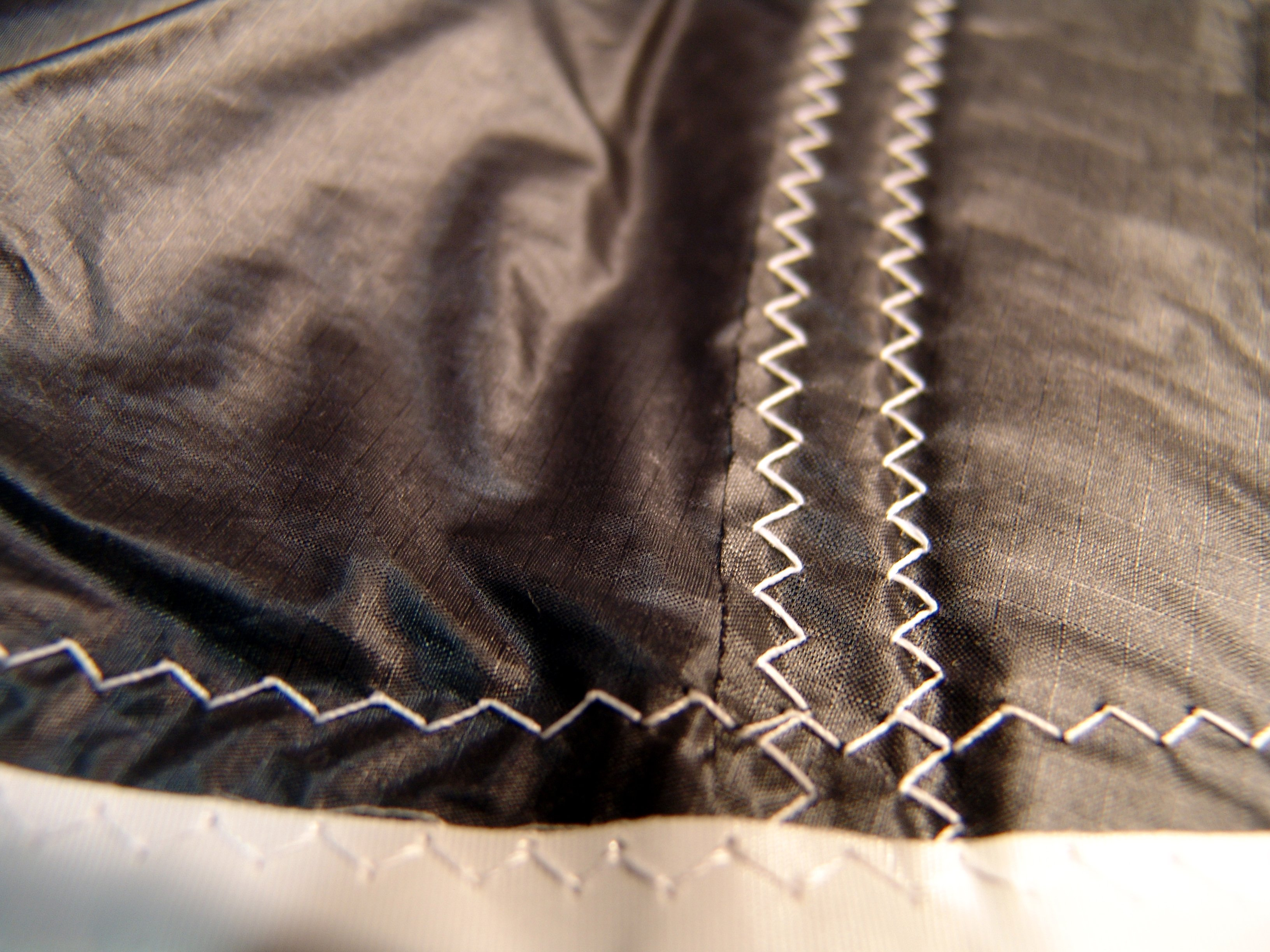 Gennaker, Spinnaker